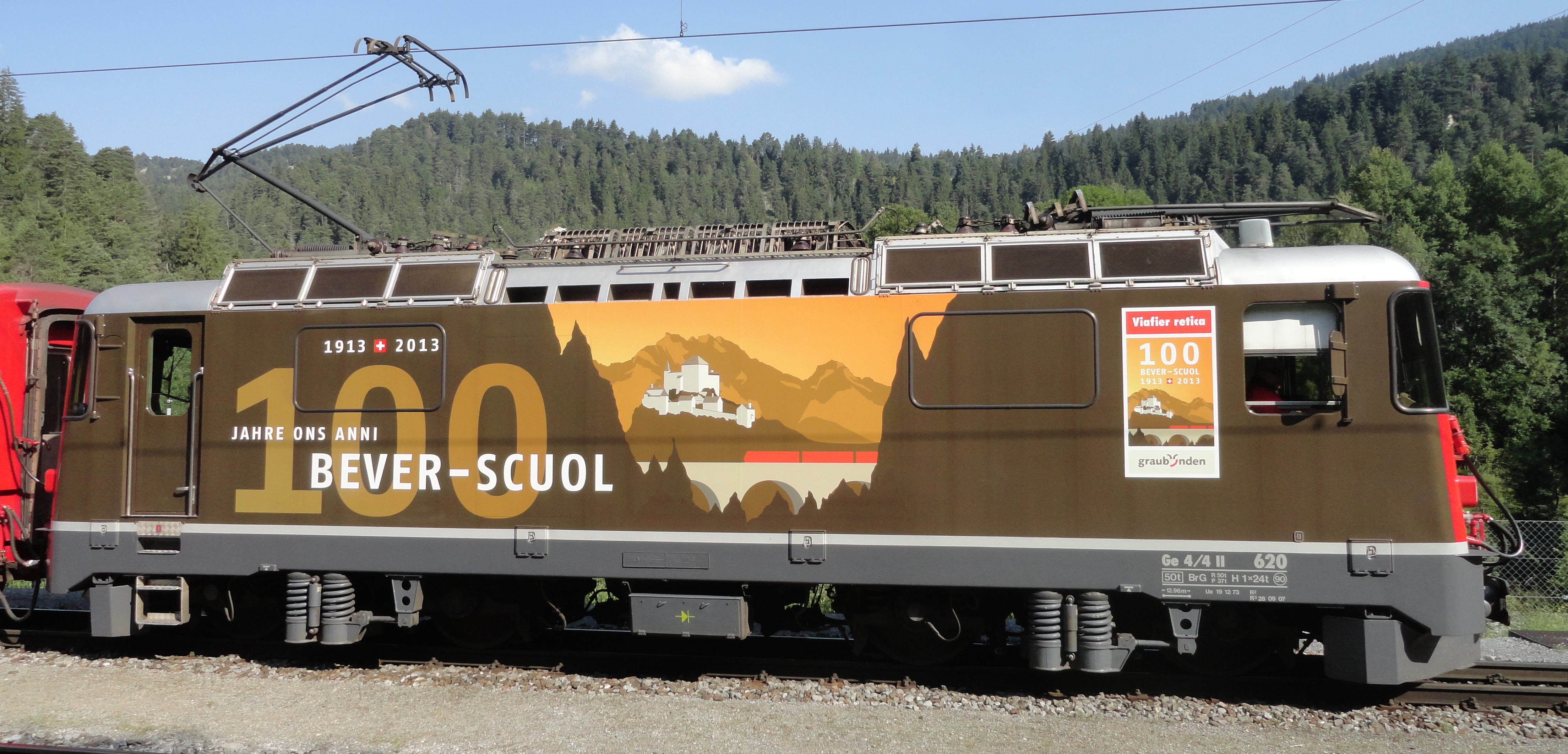 Jubiläums-Lok